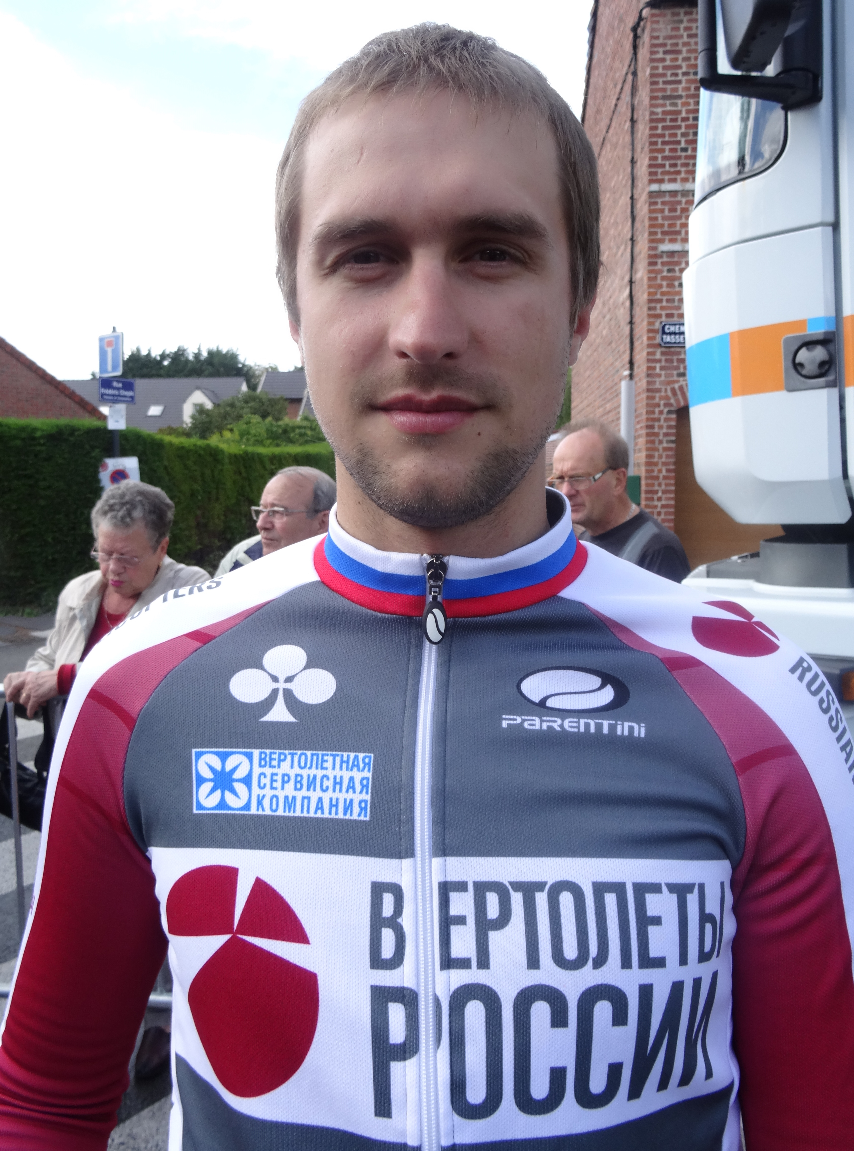 Reportage photographique réalisé le vendredi 23 mai 2014 à l'occasion du départ de la première étape du Paris-Arras Tour 2014 à Lens, Pas-de-Calais, Nord-Pas-de-Calais, France. Depicted person: Ivan Savitskiy Depicted team: Russian Helicopters